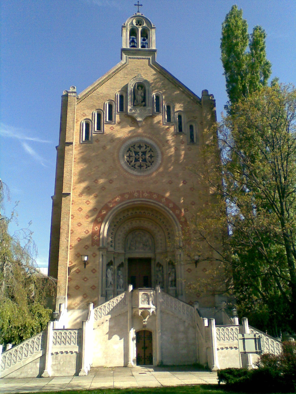 Pfarrkirche Maria vom Siege der Pfarre Arsenal in Wien